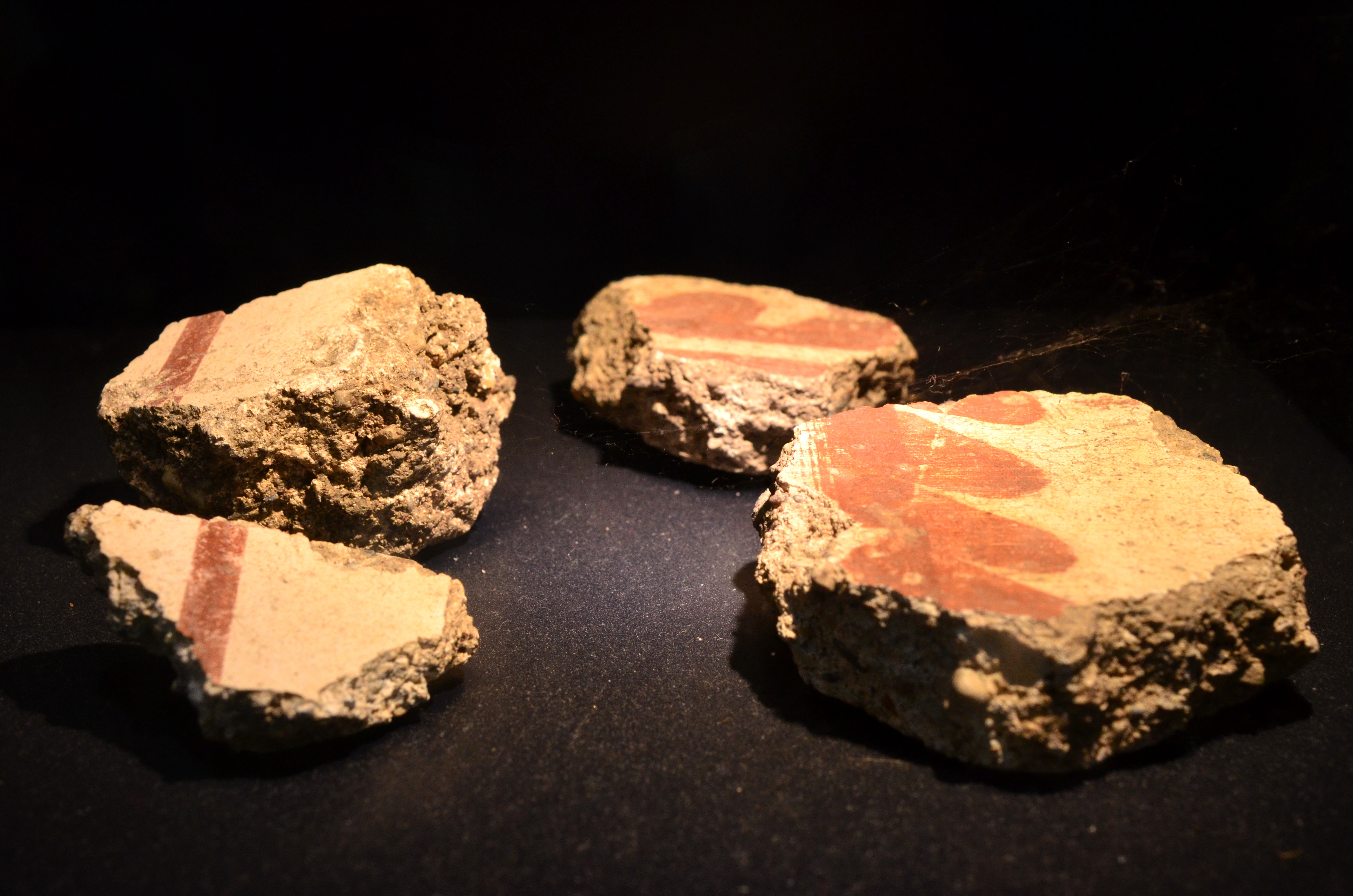 Exponat aus der Thermengasse im einstigen römischen vicus Turicum (Zürich) : Verputzreste von bemalten Wänden aus den Bädern. Beim Bad II aus dem 2./3. Jahrhundert mit feinen farbigen Linien auf grossflächig weissen Wänden. (gemäss Beschriftung in der Vitrine)